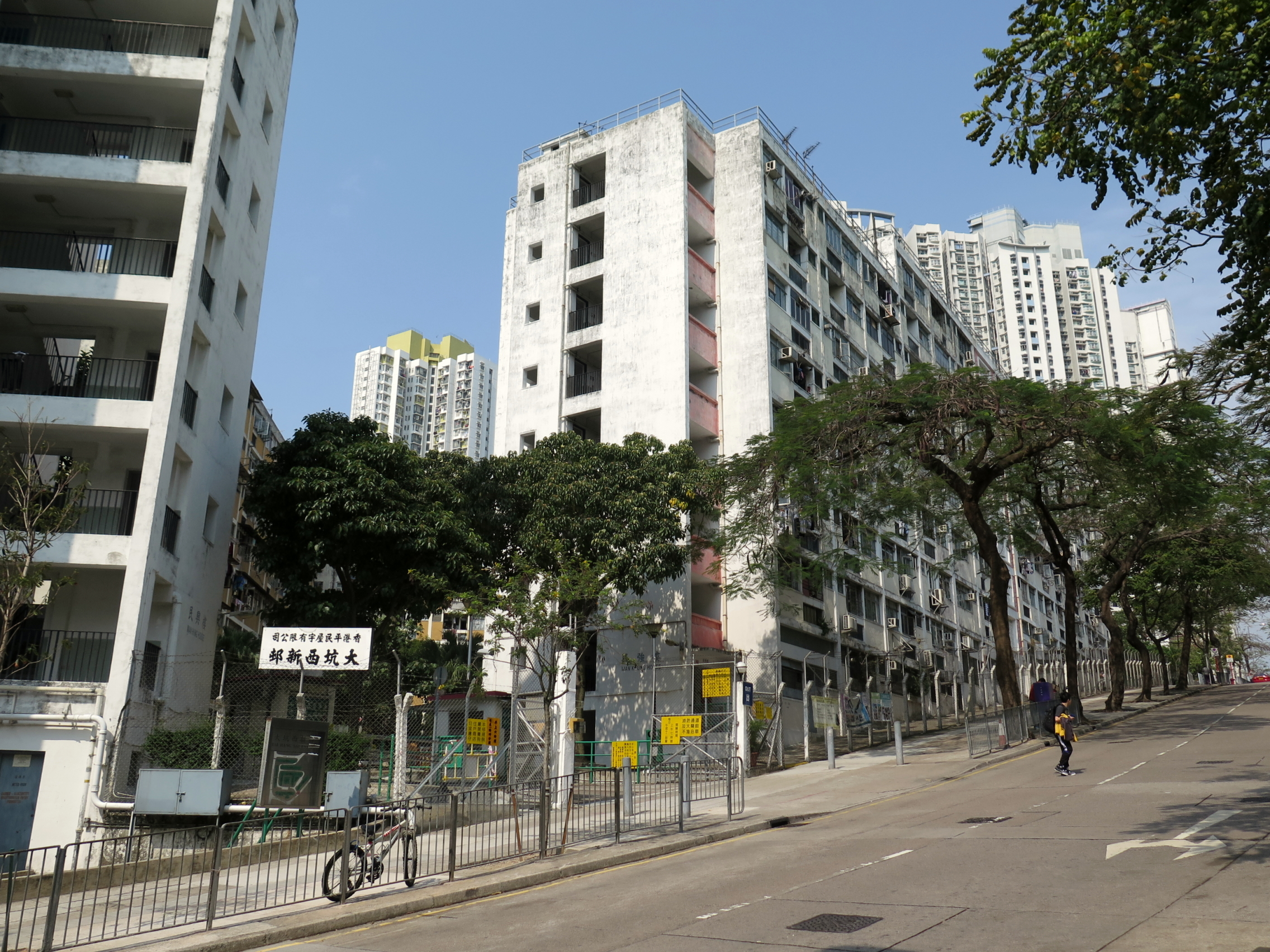 Tai Hang Sai Estate